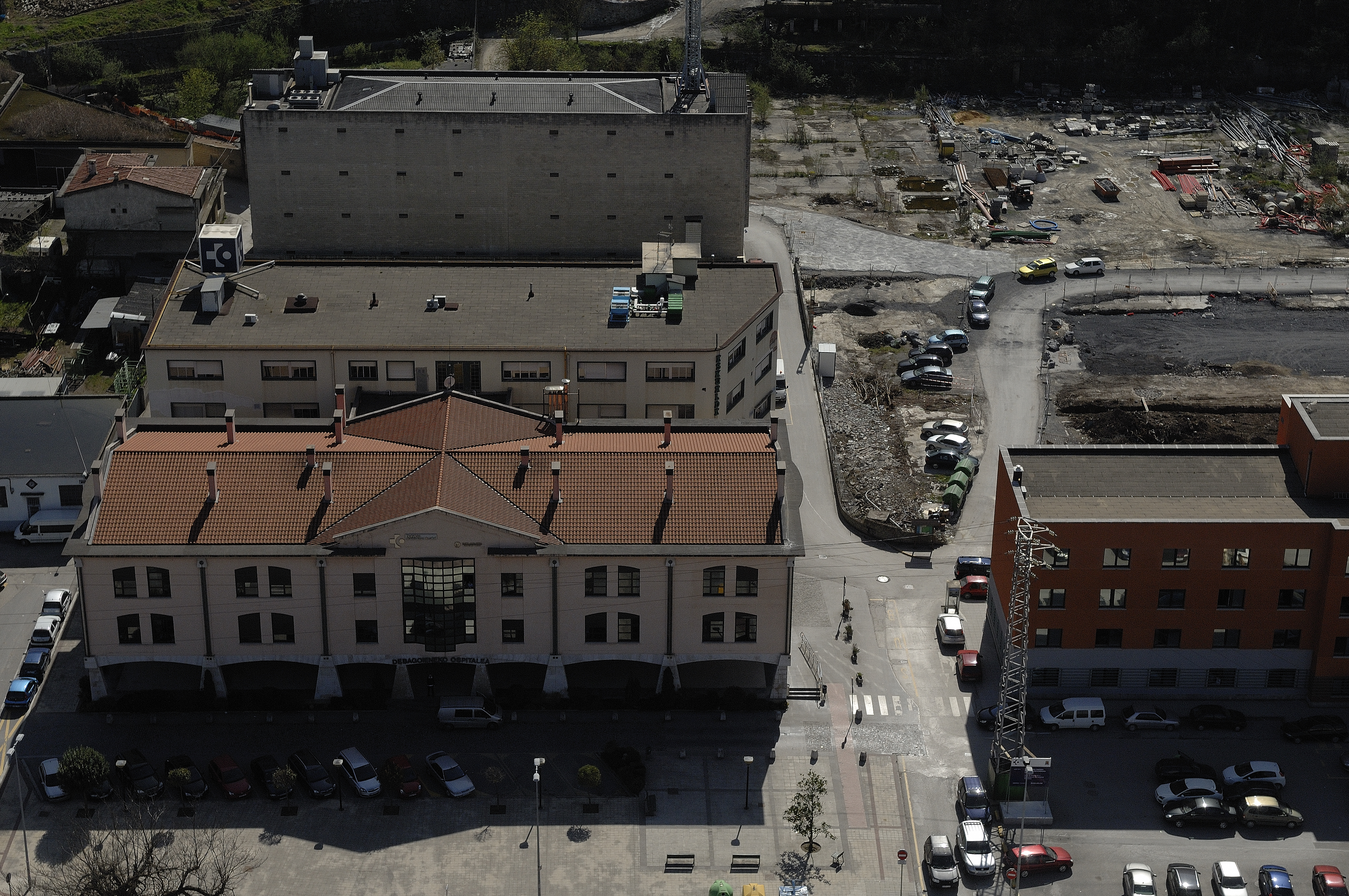 Hospital de Alto Deba